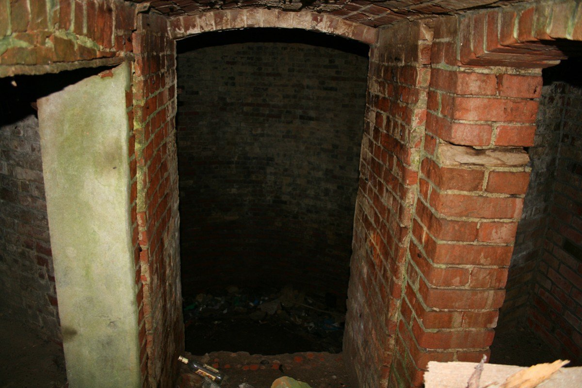 Innenräume eines Eiskellers